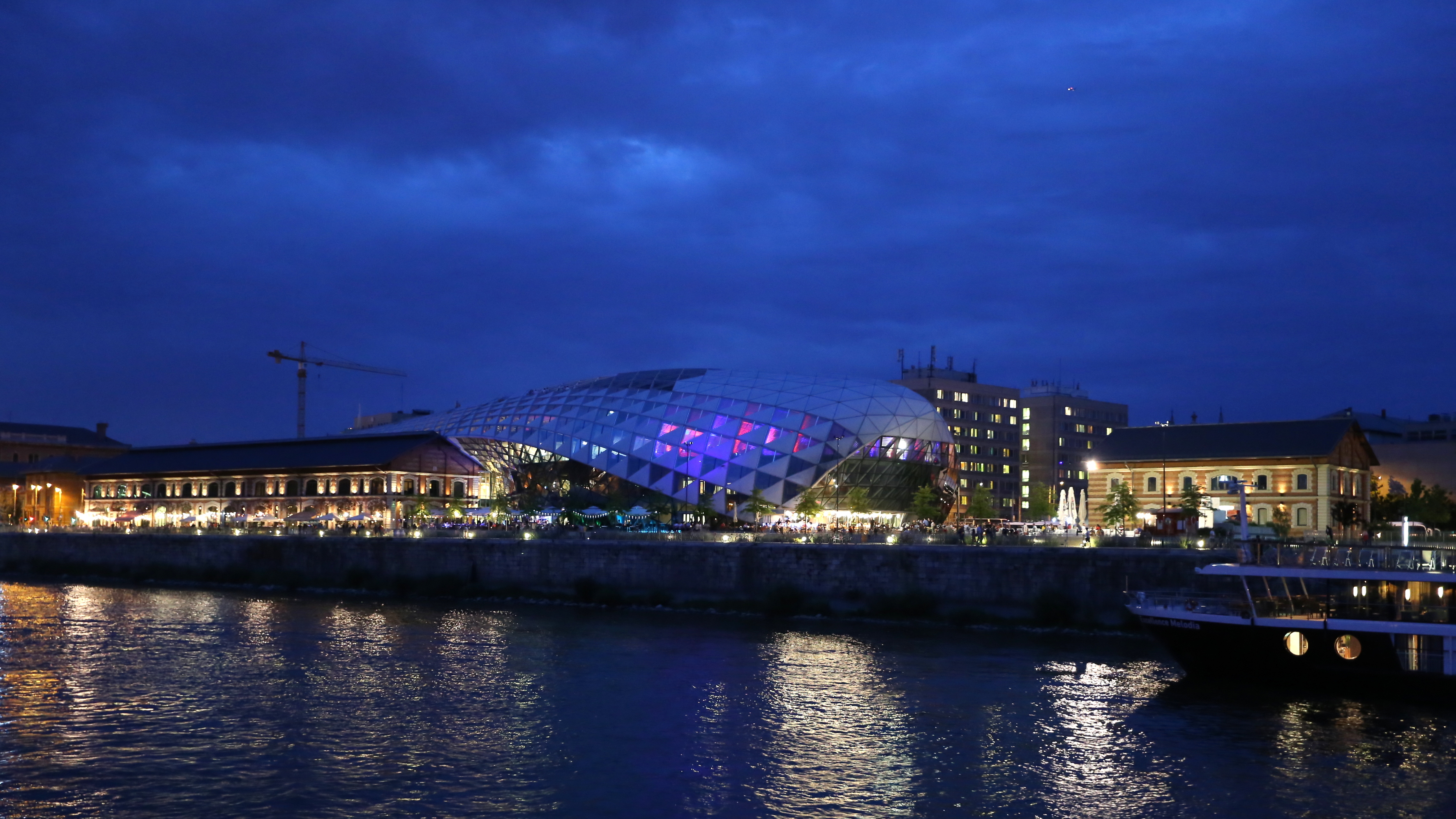 2017-ben, a Duna felől